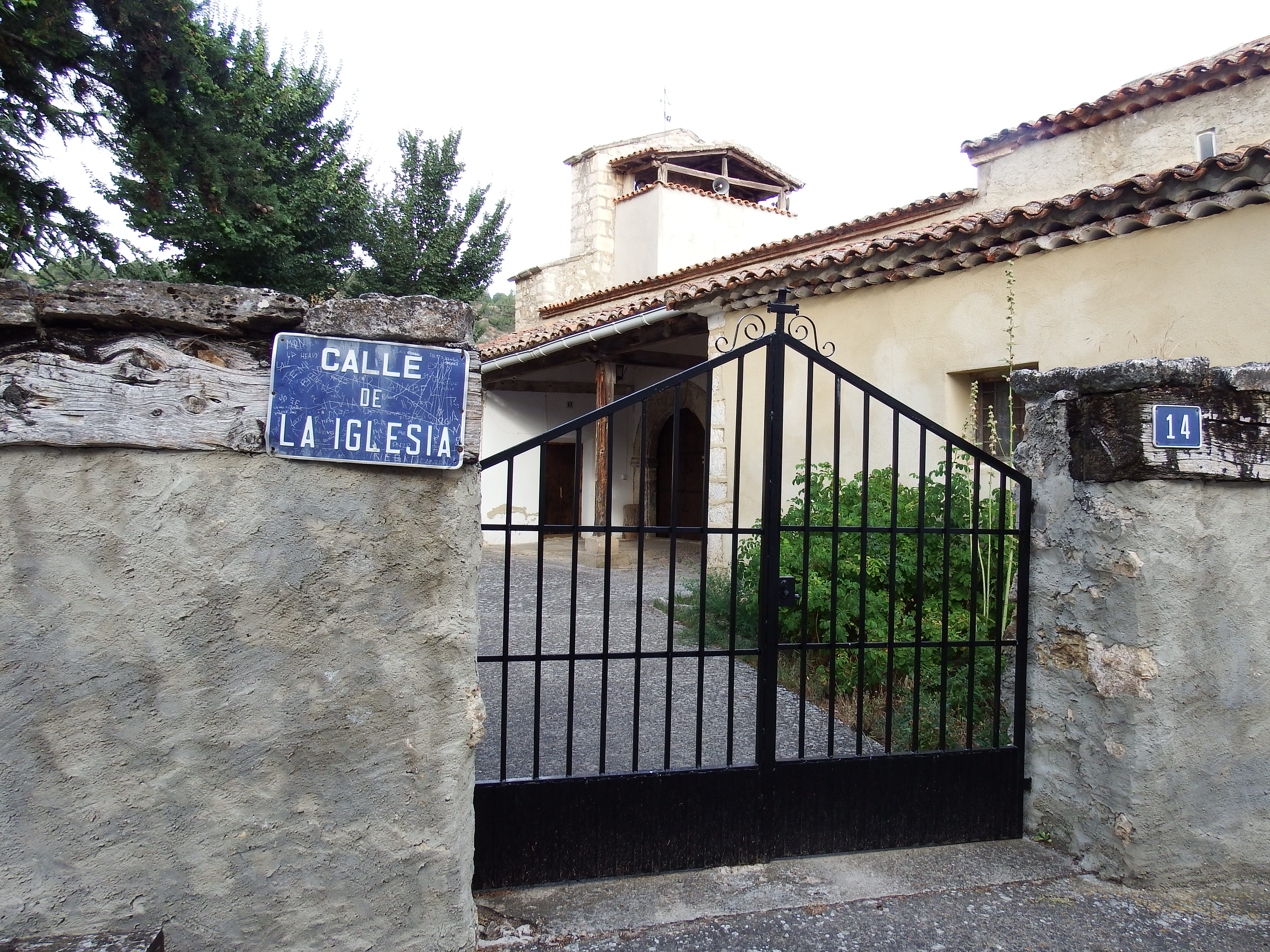 Entrada a la iglesia de Campillos-Sierra